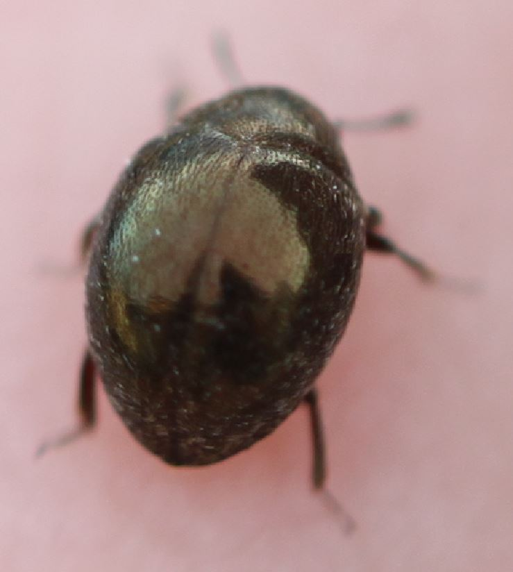 Lamprobyrrhulus nitidus am 12. April 2018 südlich von Mannheim